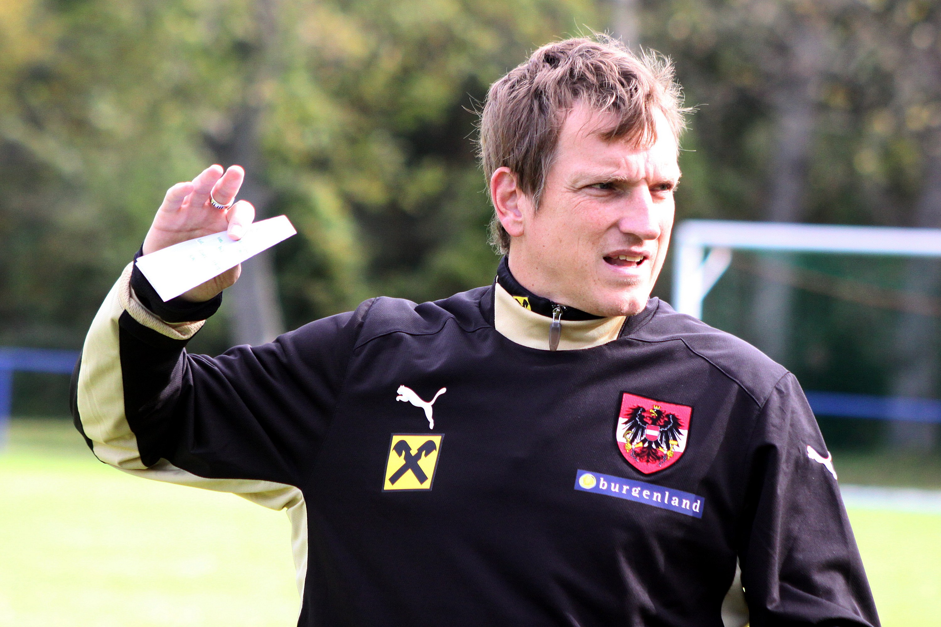 Andreas Herzog (Teamchef) - Österreichische Fußballnationalmannschaft (U-21-Männer)